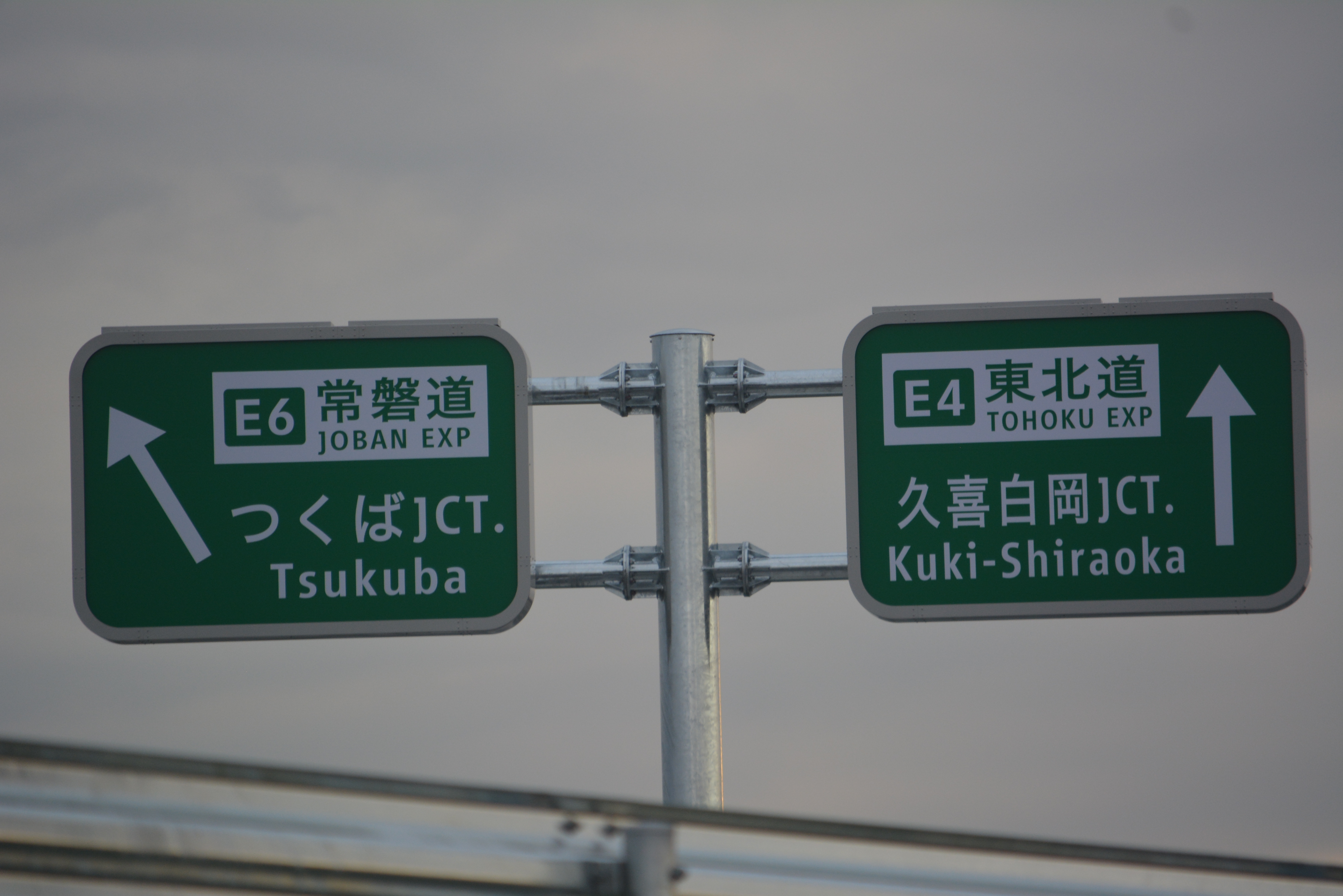 日本の高速道路における、高速道路番号を示した方面及び方向(108の2-E)の道路標識。圏央道常総IC。常総市。